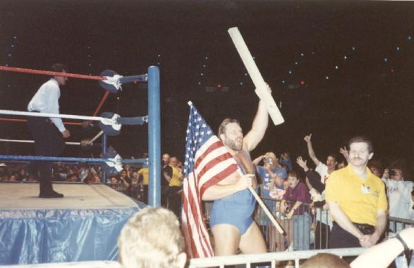 Hoooo!